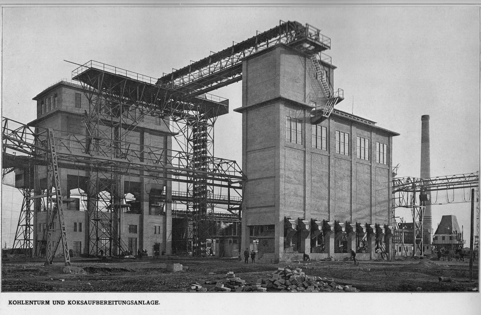 Städtische Gaswerk Leopoldau: Kohlenturm und Koksaufbereitungsanlage